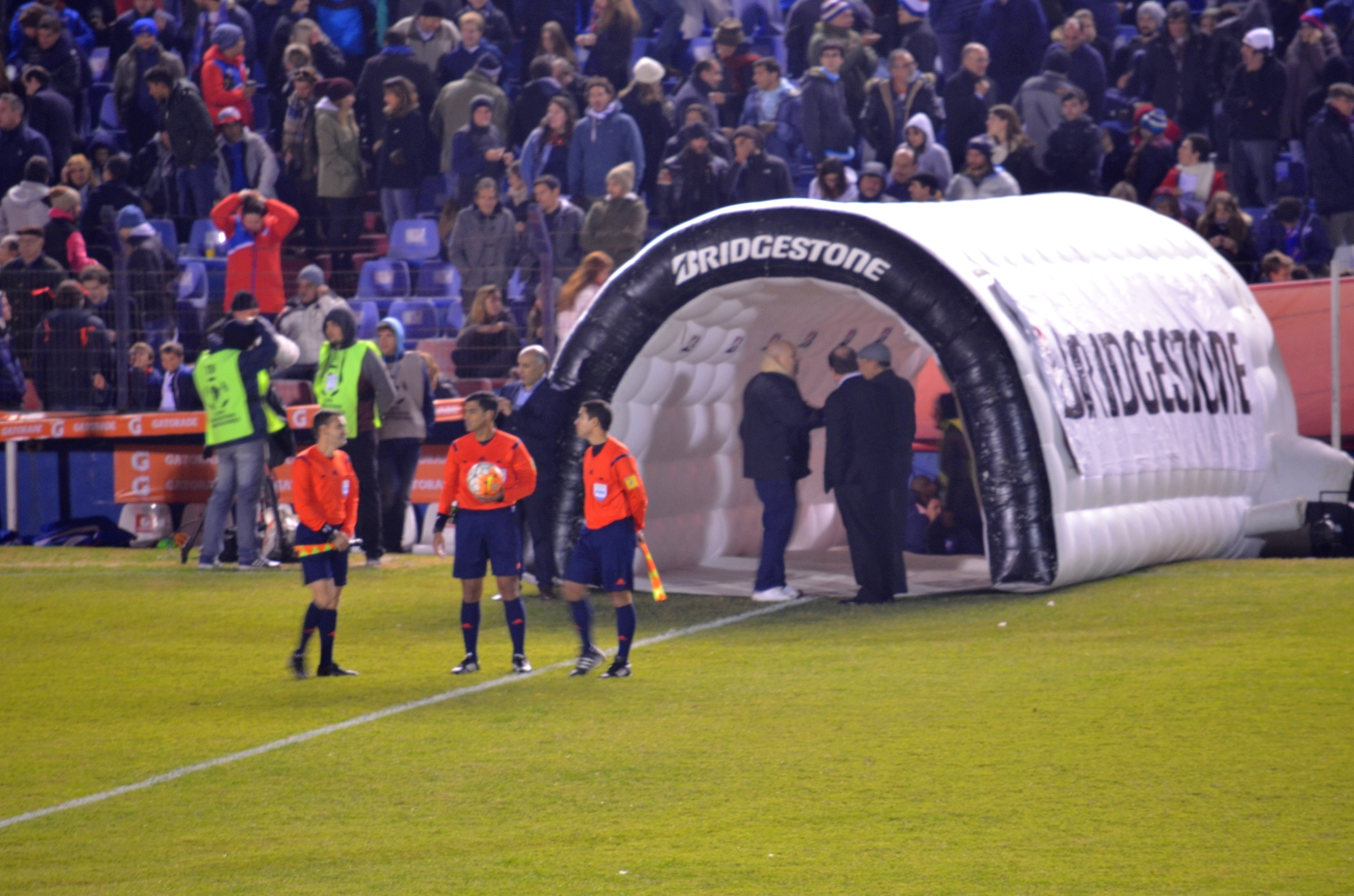 Imagen del partido disputado entre Nacional y Boca Juniors, en el estadio Gran Parque Central, por los cuartos de final de la Copa Libertadores 2016